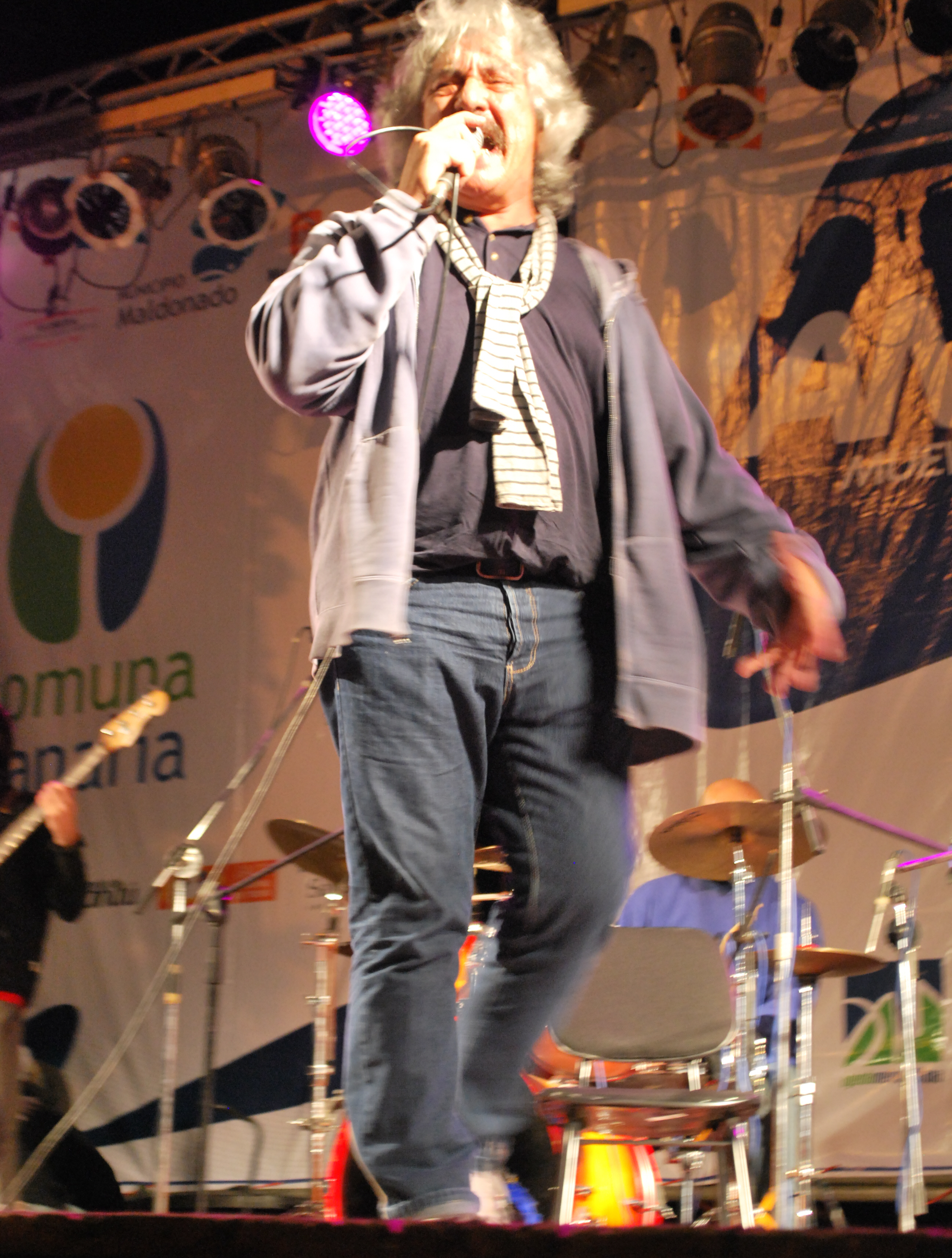 Fotografía del músico popular uruguayo José Carbajal "El Sabalero" en un espectáculo brindado en Atlántida (Canelones), en el marco del programa "Uruguay a toda costa".